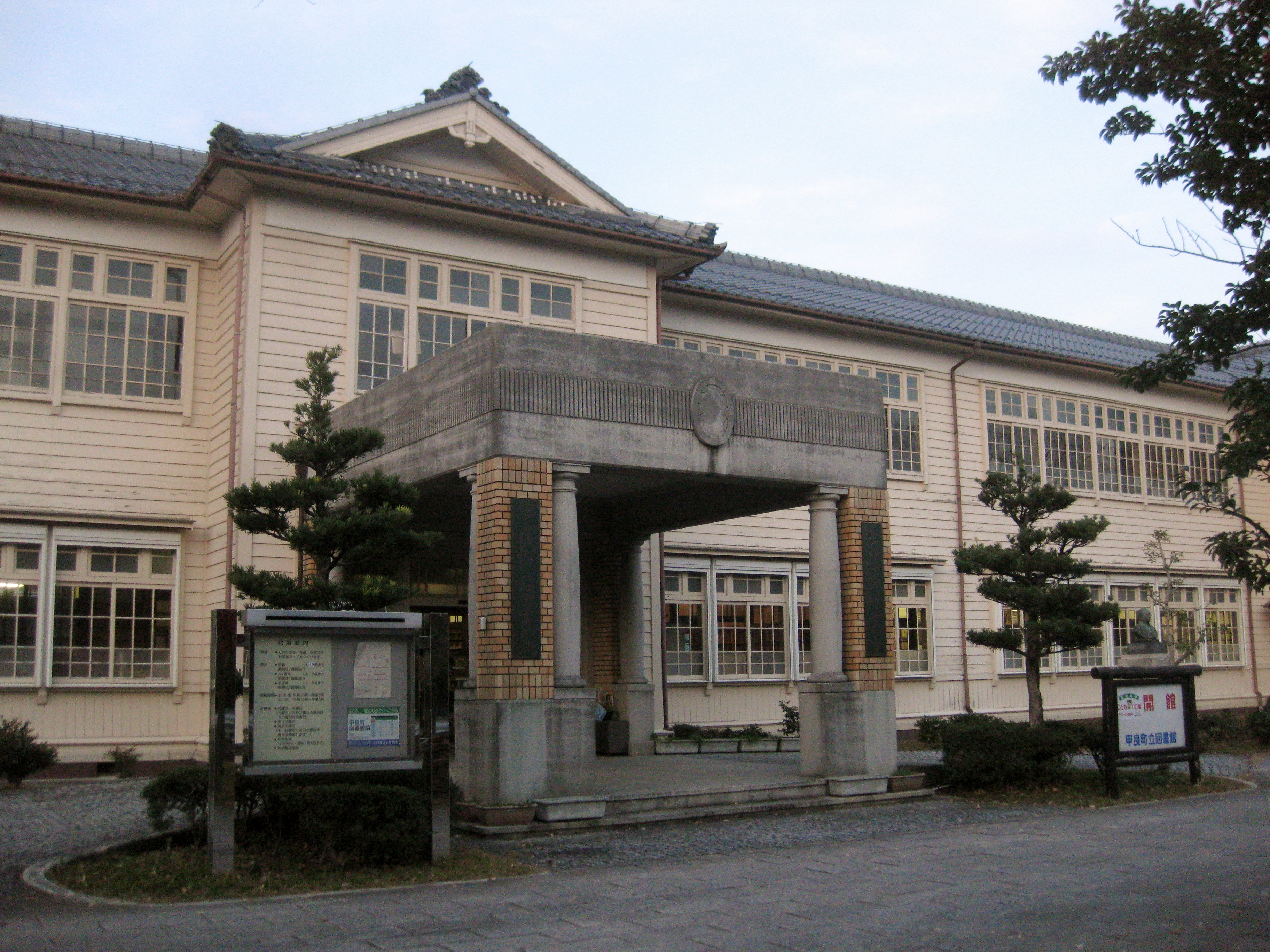 甲良町立図書館。旧甲良東小学校校舎。